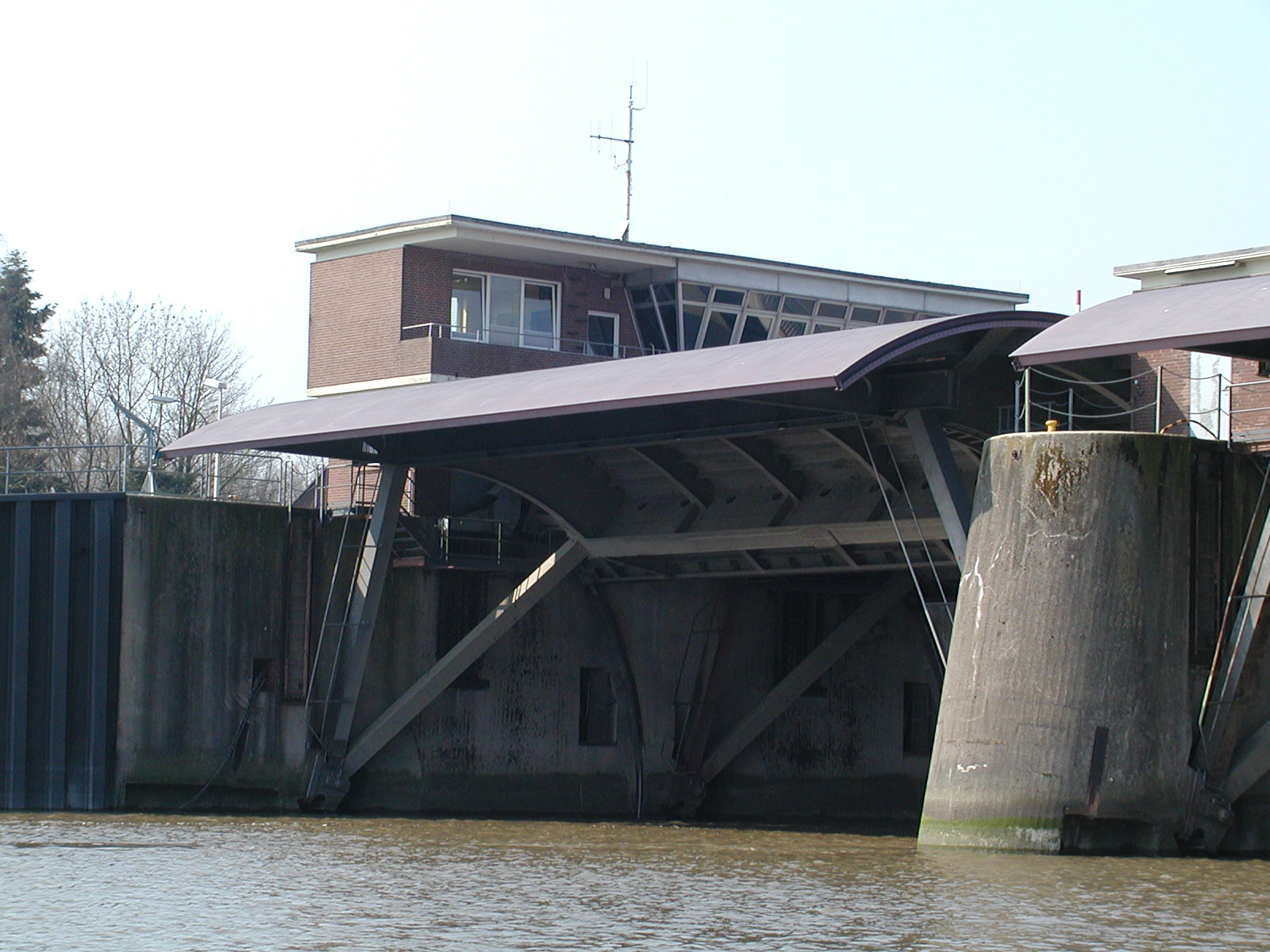 Der Kontrollturm eine der fünf Öffnungen mit einer Breite von je 22 m. In den beiden rechten und linken Öffnungen wurden fast halbrunde schalenförmige Segmente mit einem Gewicht von 70 t eingebaut. Diese Schalen werden mit Elektromotoren angetrieben und stehen in der Ruhestellung mit der Öffnung nach unten, um möglichst eine geringe Sichtbehinderung für die Schifffahrt darzustellen